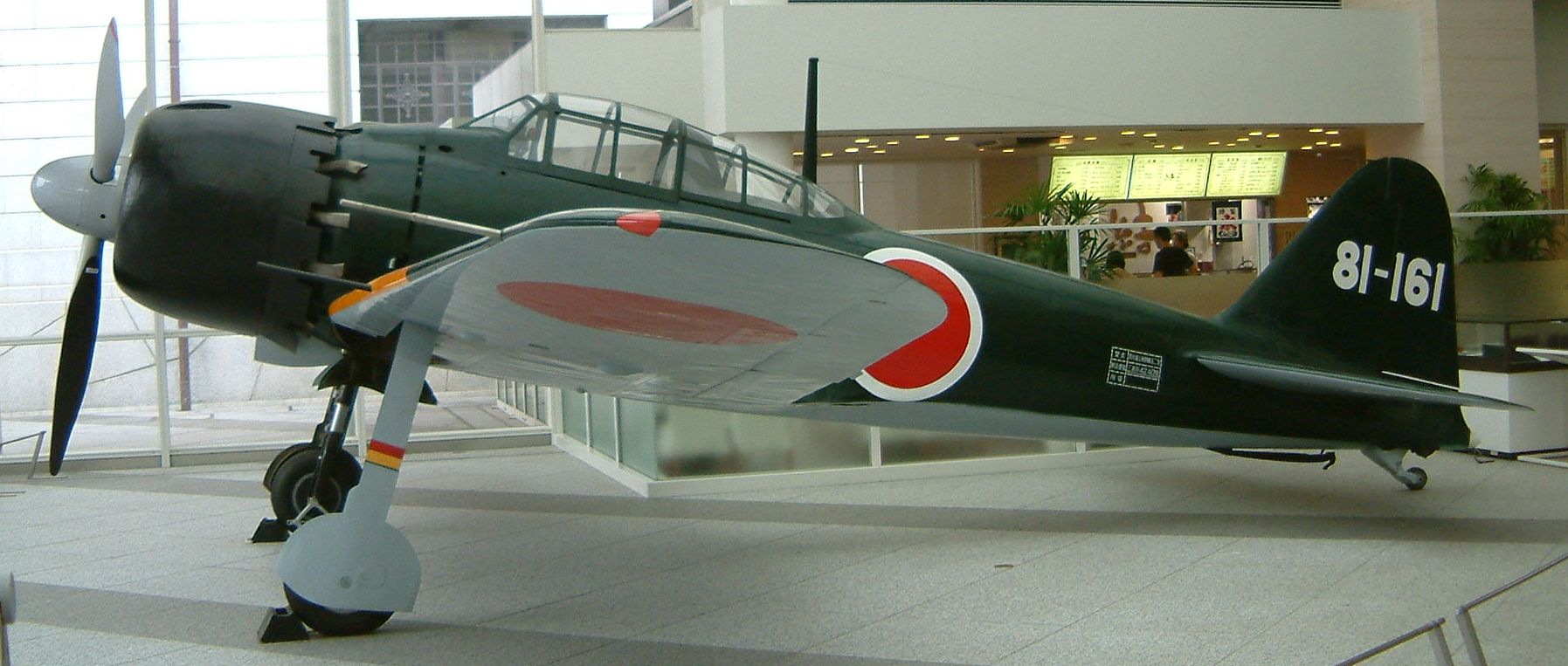 Mitsubishi Zero Model 52 (A6M5) Location: Yasukuni Shrine Yushukan, Tokyo